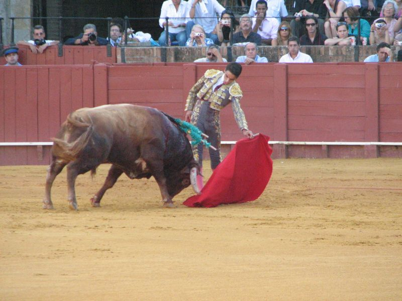 Corrida en la Maestranza sevillana